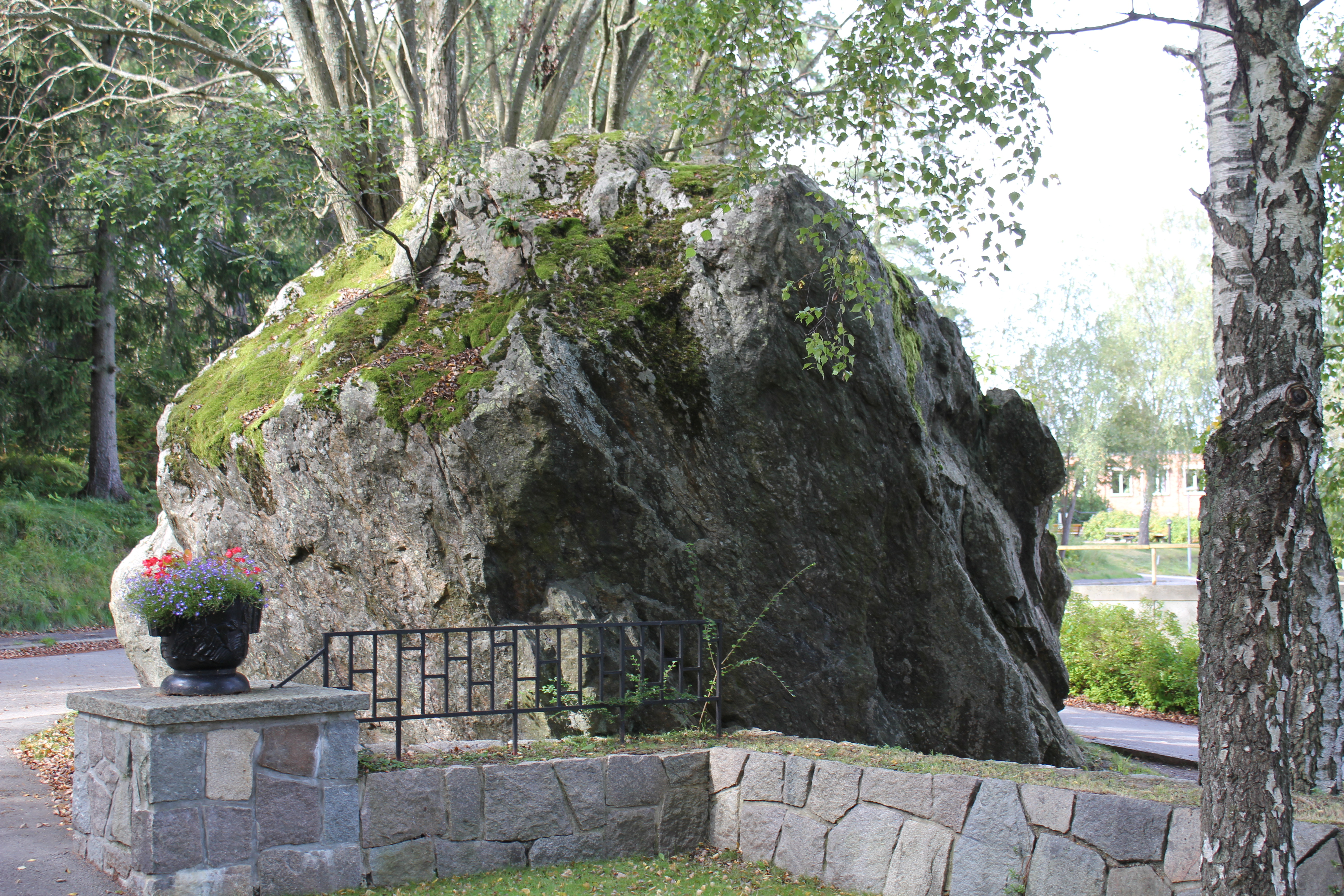 Flyttblocket "Biskopsstenen" vid Tomtberga kyrkogård i Huddinge.